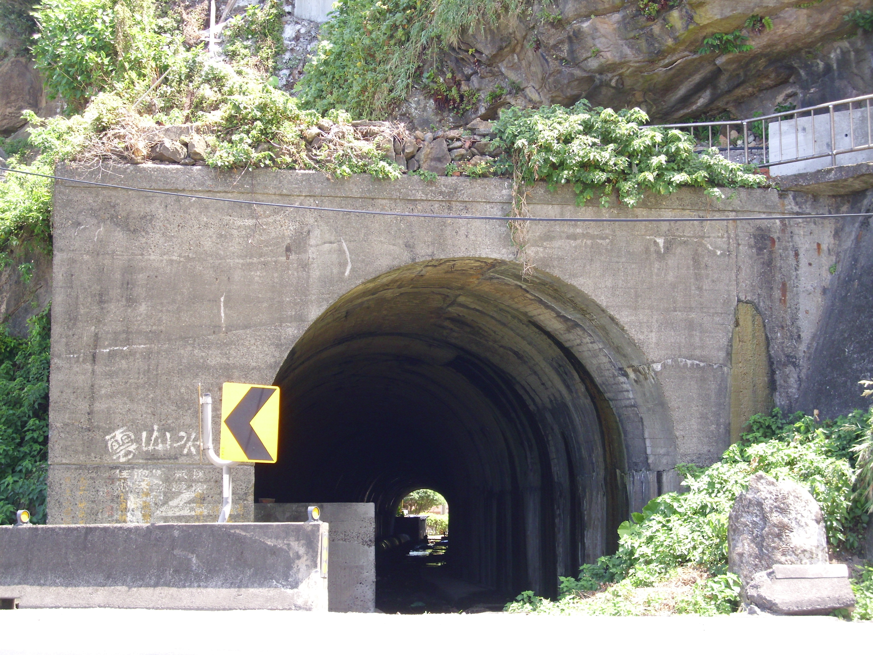 深澳線四號隧道（第四隧道）